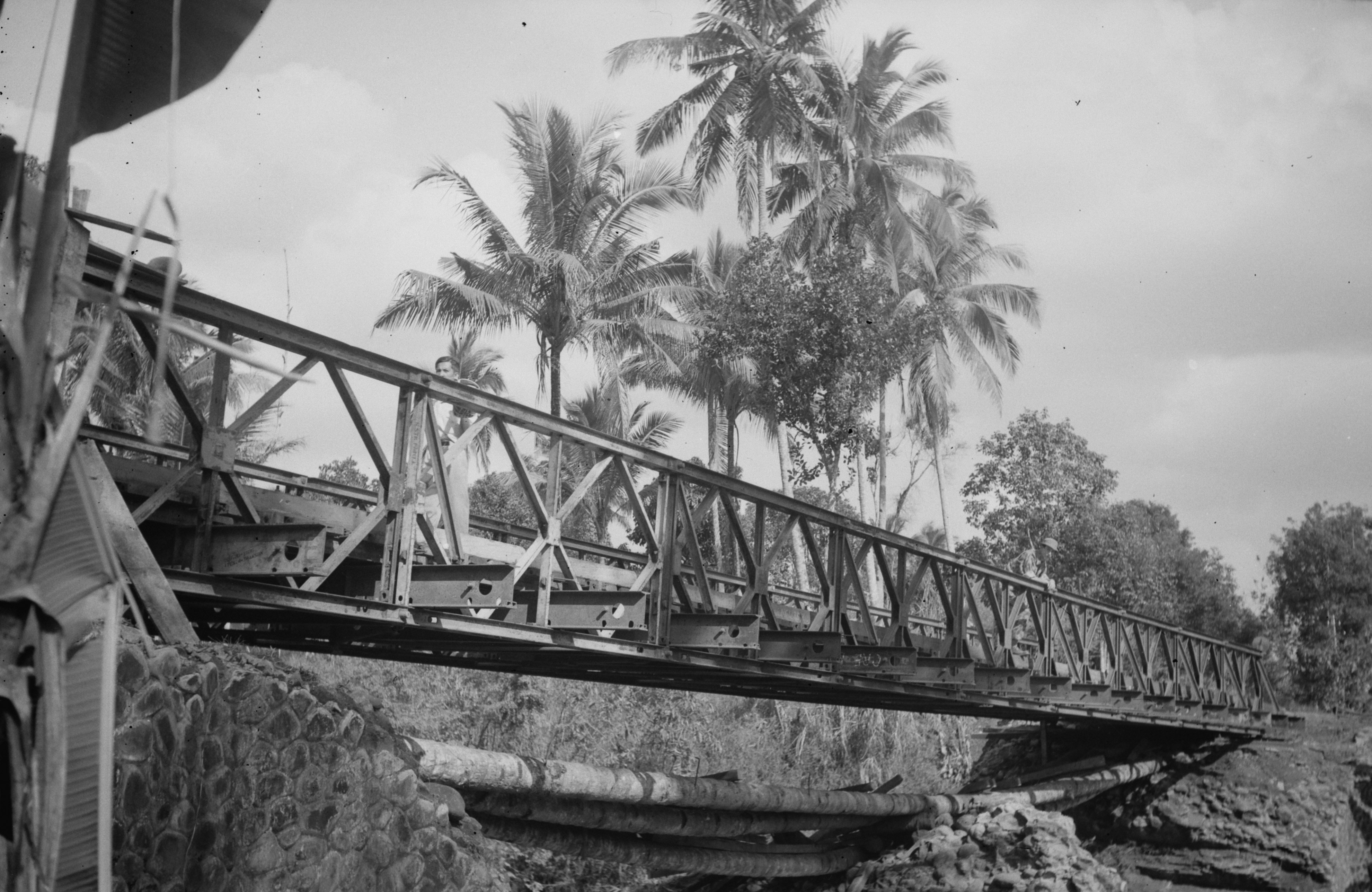 Collectie / Archief : Fotocollectie Dienst voor Legercontacten Indonesië Reportage / Serie : [DLC] Reportage De Leng Soekaboemi Beschrijving : Soekaboemi: De intact gebleven spoorbrug van Pamoejoeran. Datum : 26 juli 1947 Locatie : Indonesië, Nederlands-Indië Fotograaf : Fotograaf Onbekend / DLC Auteursrechthebbende : Nationaal Archief Materiaalsoort : Negatief (zwart/wit) Nummer archiefinventaris : bekijk toegang 2.24.04.03 Bestanddeelnummer : 11712